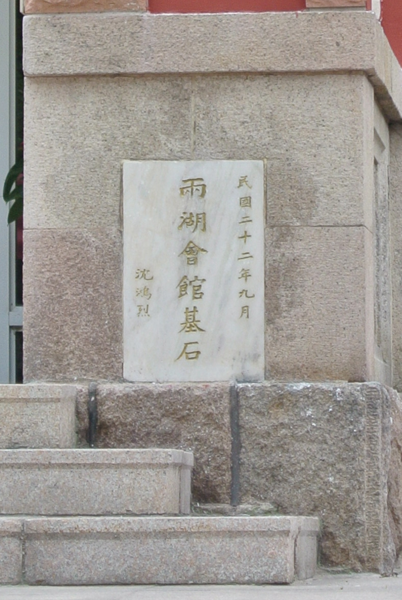 青岛两湖会馆旧址奠基石 2017-08-29